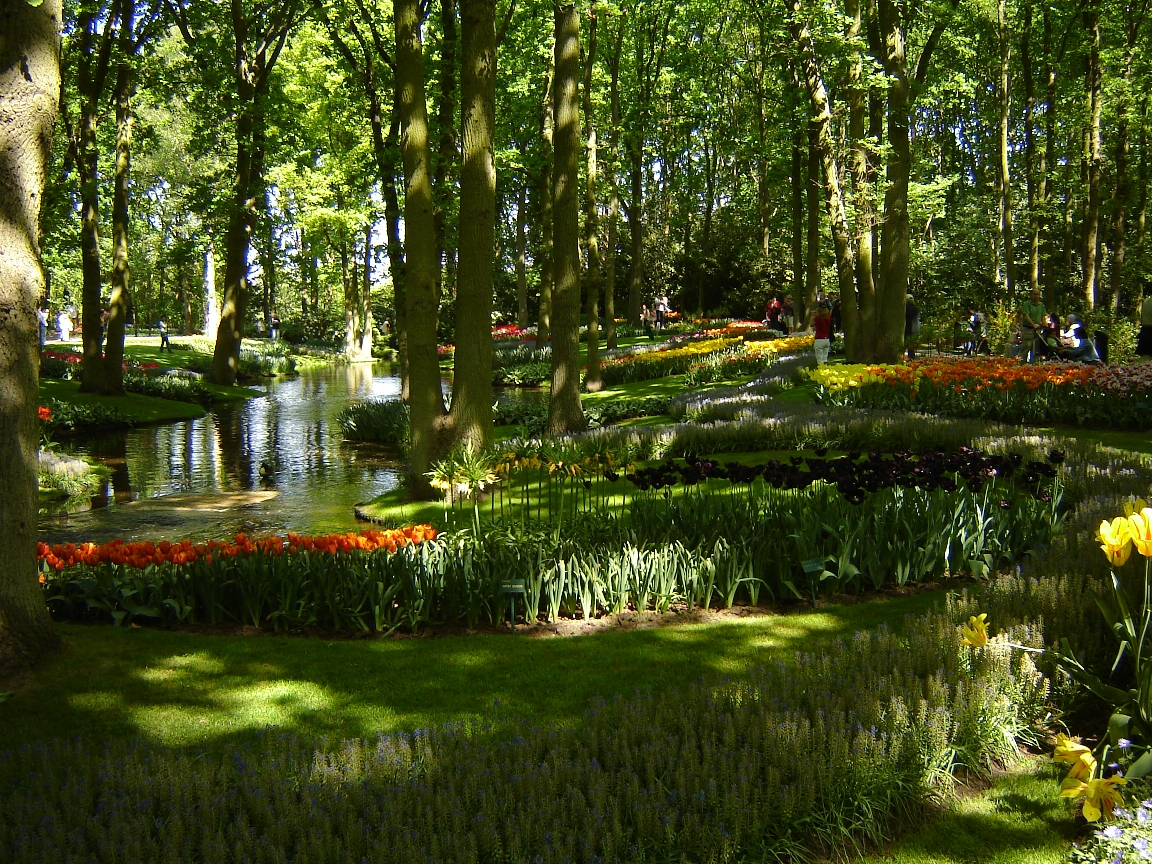 Keukenhof tulip gardens in Lisse, the Netherlands